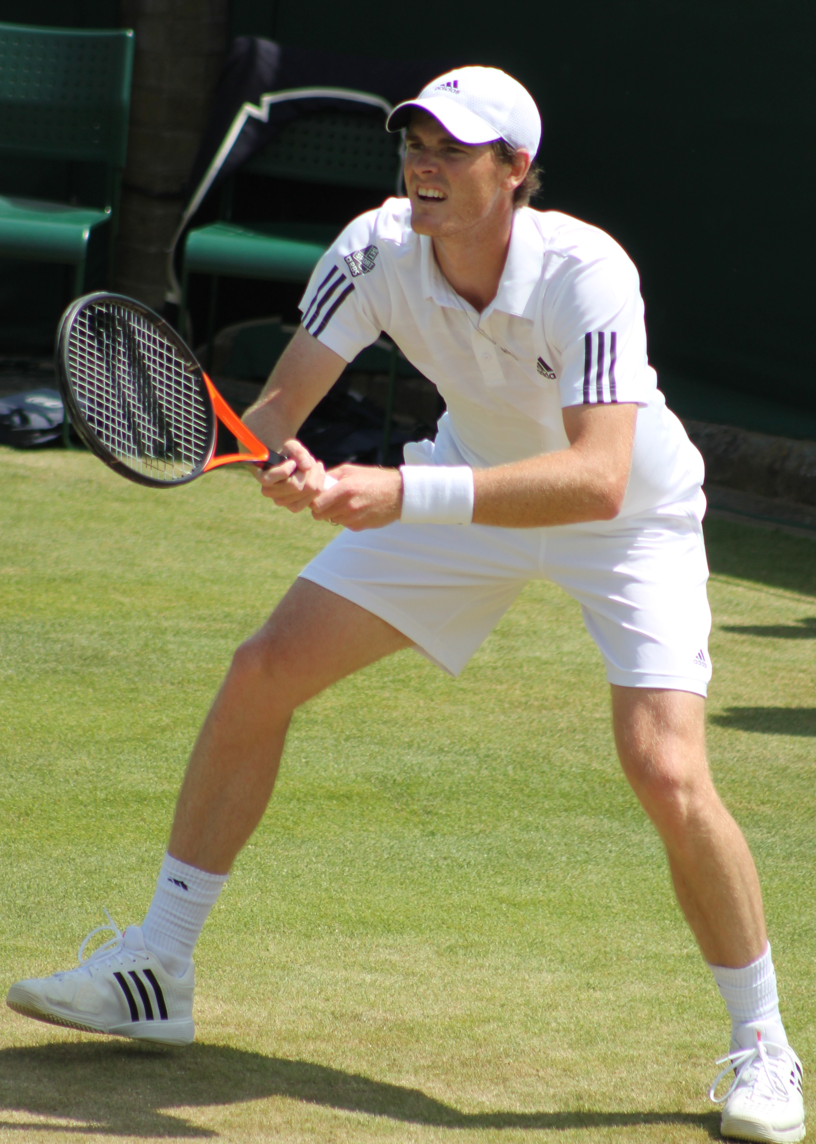 Murray J. WM13